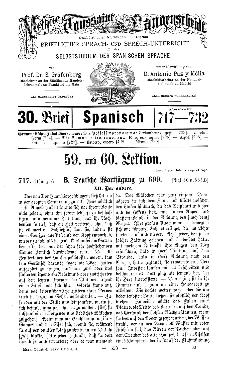 Methode Toussaint-Langenscheidt, Brieflicher Sprach- und Sprech-Unterricht für das Studium der Spanischen Sprache; 30. Brief, Abschnitt 117-732, 59. und 60. Lektion; Titelblatt.